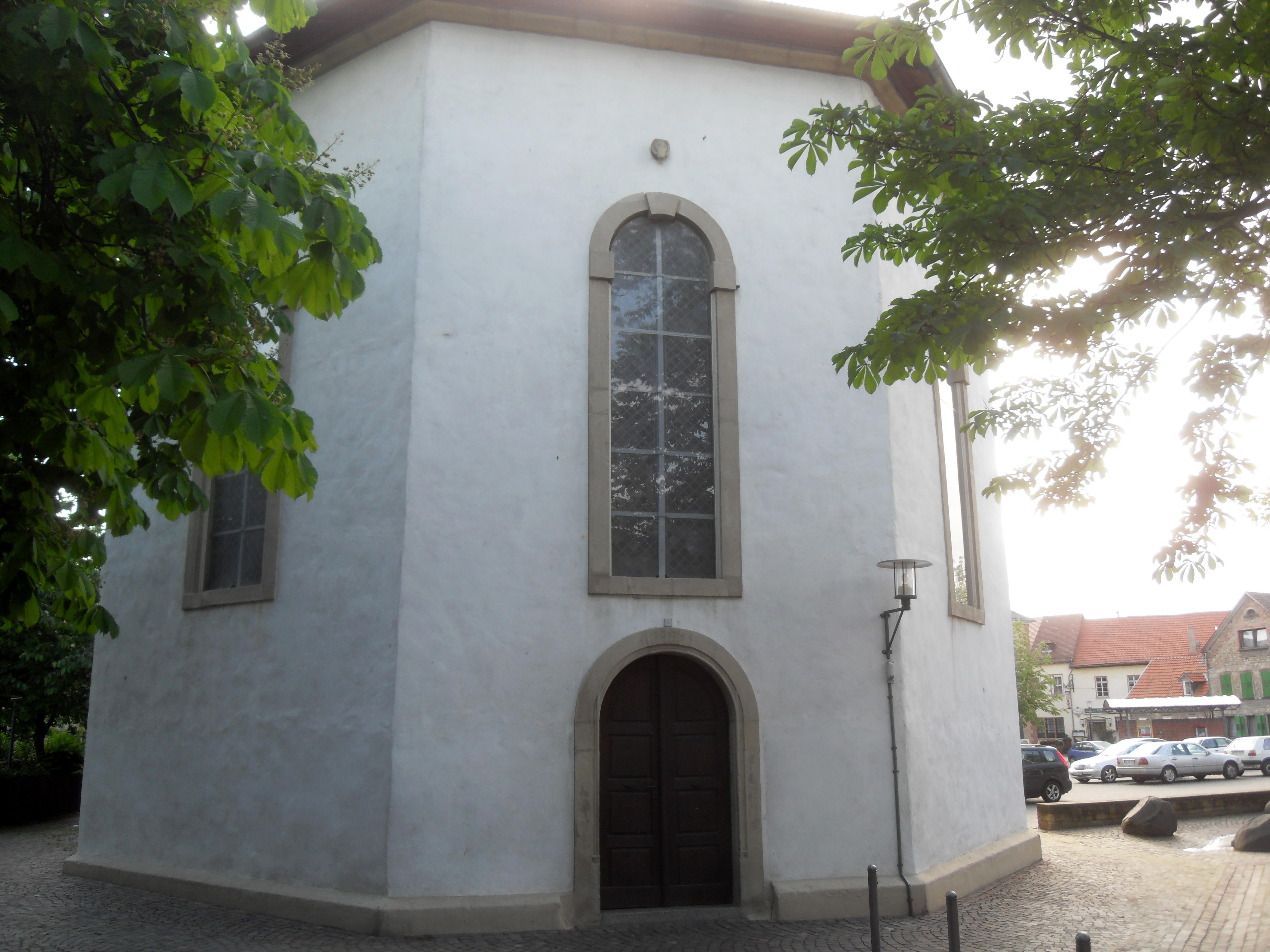 Der Osteingang der Guntersblumer evangelischen Kirche in Rheinhessen in Rheinland-Pfalz (Deutschland)